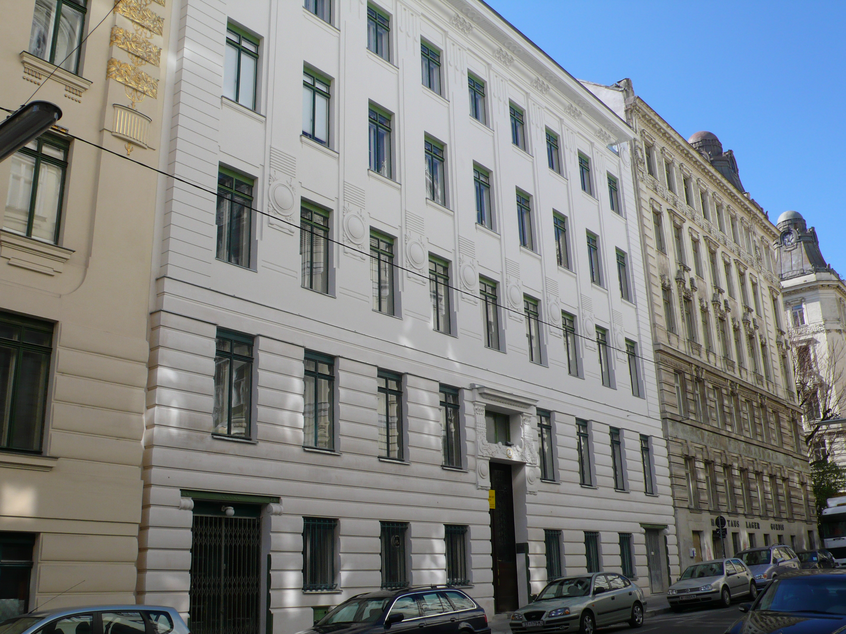 Wien, Köstlergasse 3 renoviert; Otto Wagner